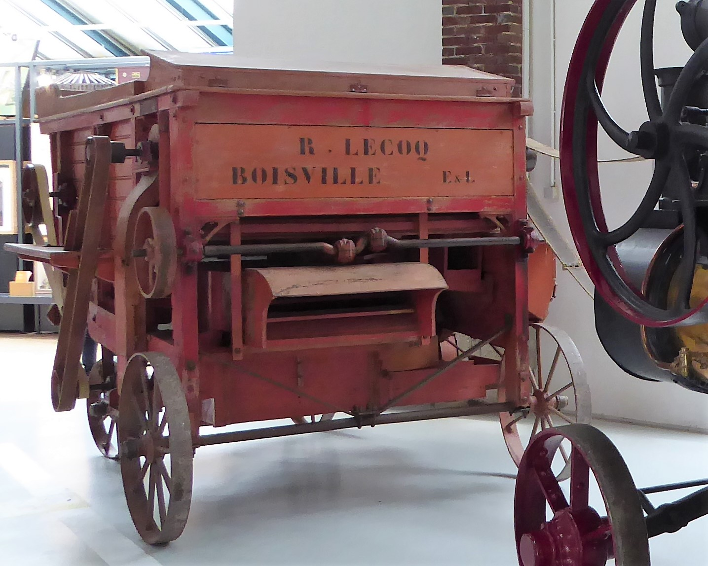 batteuse "R. Lecoq Boisville E & L" ca1930, Compa de Mainvilliers, Eure-et-Loir, France.